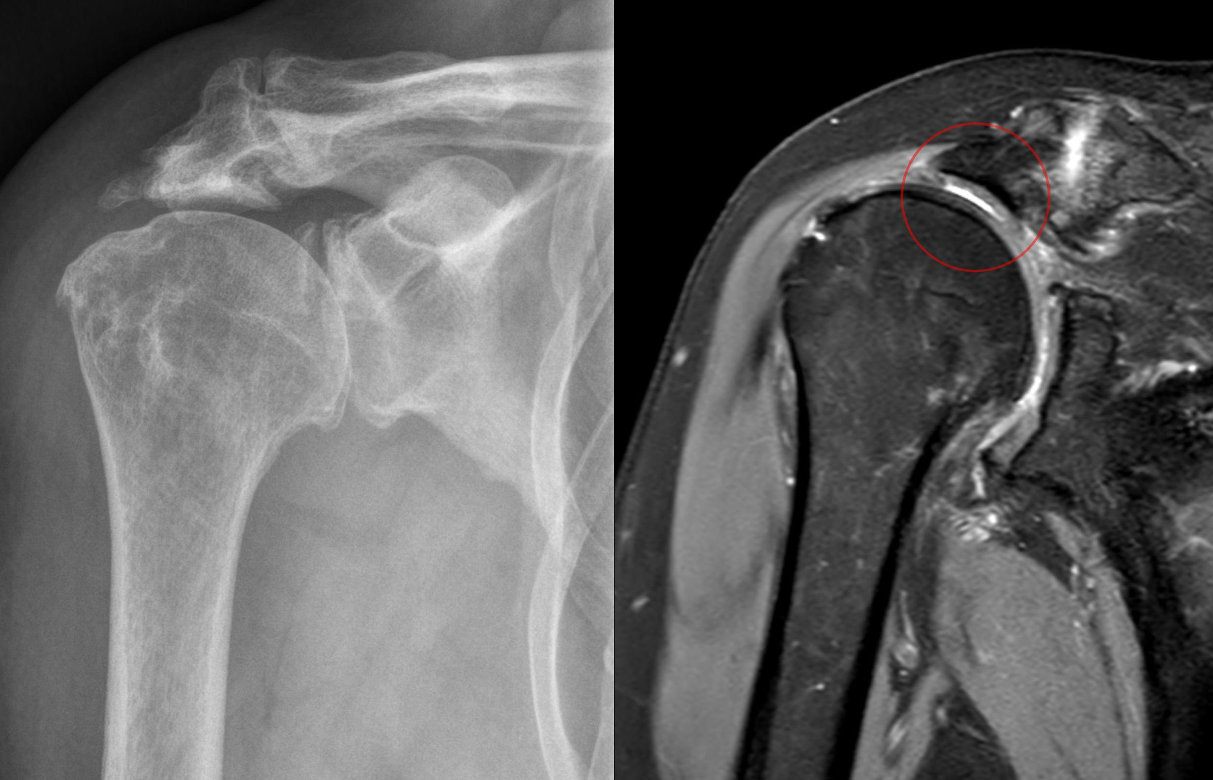 Bei ausgeprägter Schädigung der Rotatorenmanschette Ausbildung eines Neogelenks zwischen Humeruskopf und Unterfläche des Akromions. Man erkennt im Röntgenbild die konkave Umformung des Akromions und im MRT sogar eine Gewebeschicht an der Unterfläche, die von der Signalgebung (hier PDW FS cor) der des Gelenkknorpels am Humerus entspricht. Daneben Zeichen der Omarthrose und einer ausgeprägt hypertrophen AC-Gelenkarthrose.